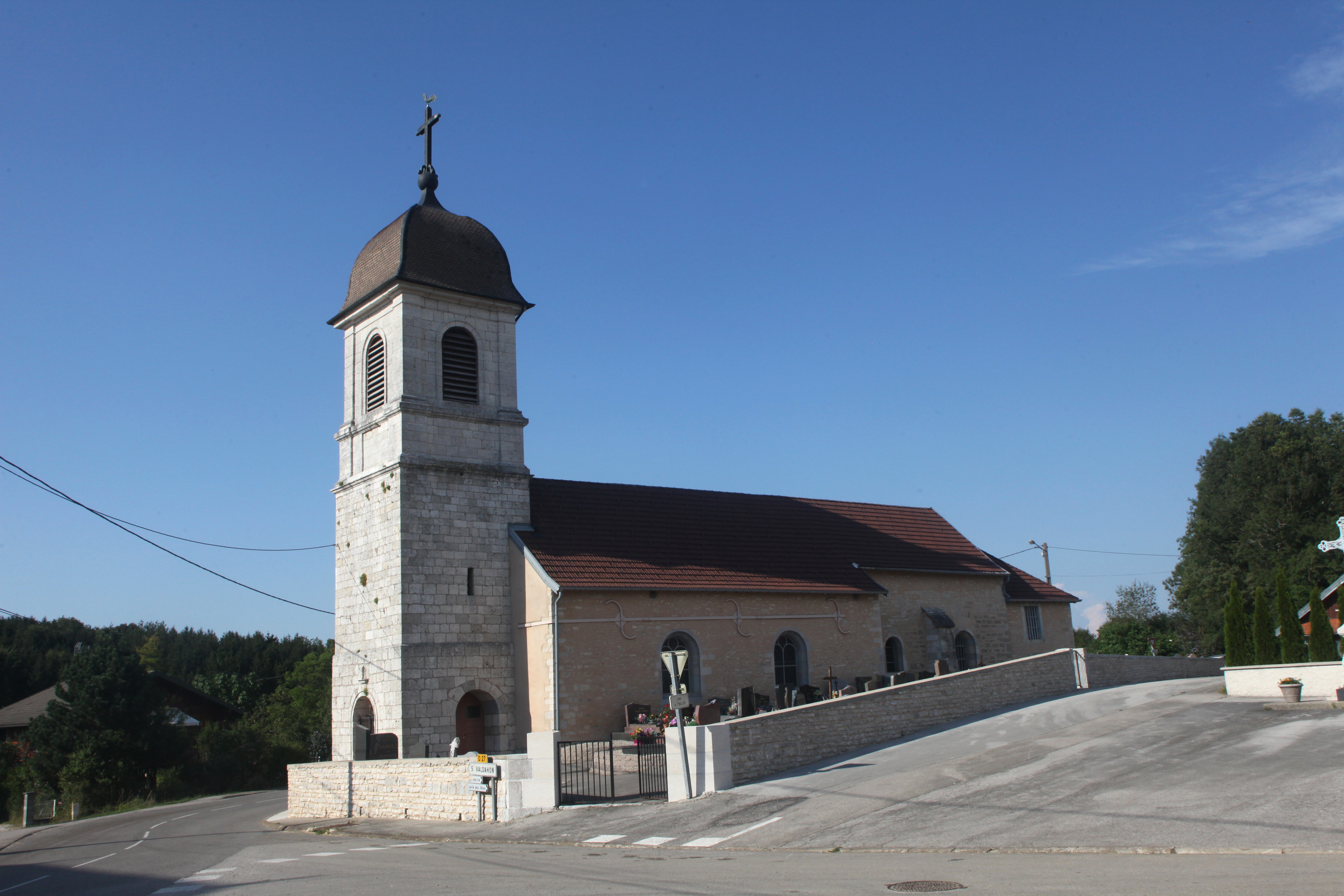 Église de Fallerans (Doubs).